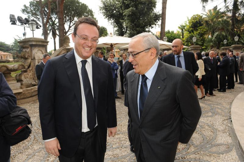 Francesco Gaetano Caltagirone e Mario Orfeo al Convegno degli Amici della LUISS del 2009 a Roma.